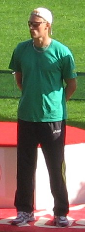 Mikael Westö Kalevan kisoissa, Ratinan stadionilla, Tampereella, 26. heinäkuuta 2008